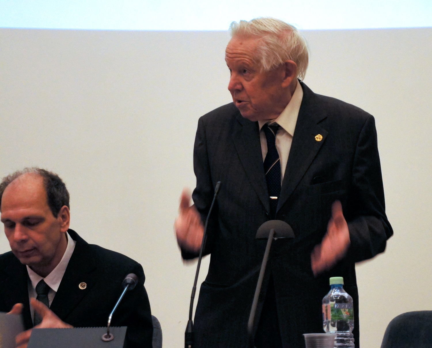 Выступление академика Д. В. Рундквиста